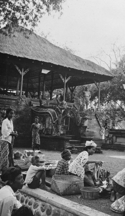 Foto. Toerist M.C. Westerman en souvenirverkopers bij de Kerta Gosa, Kloengkoeng